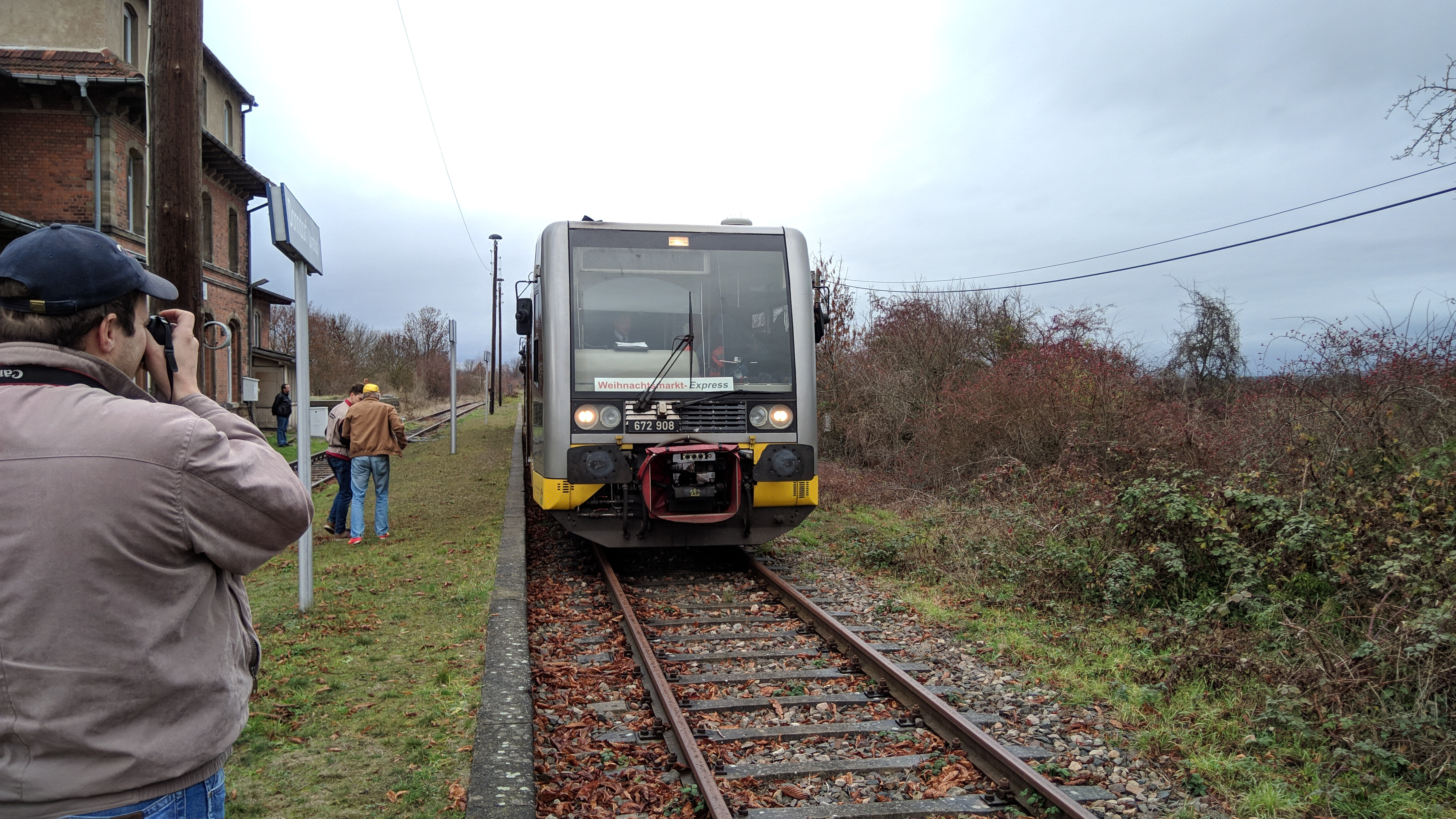 Eine Doppeltraktion der Baureihe 672 der Burgenlandbahn als Sonderfahrt des IG Unstrutbahn e.V. beim Führerstandswechsel in Donndorf.